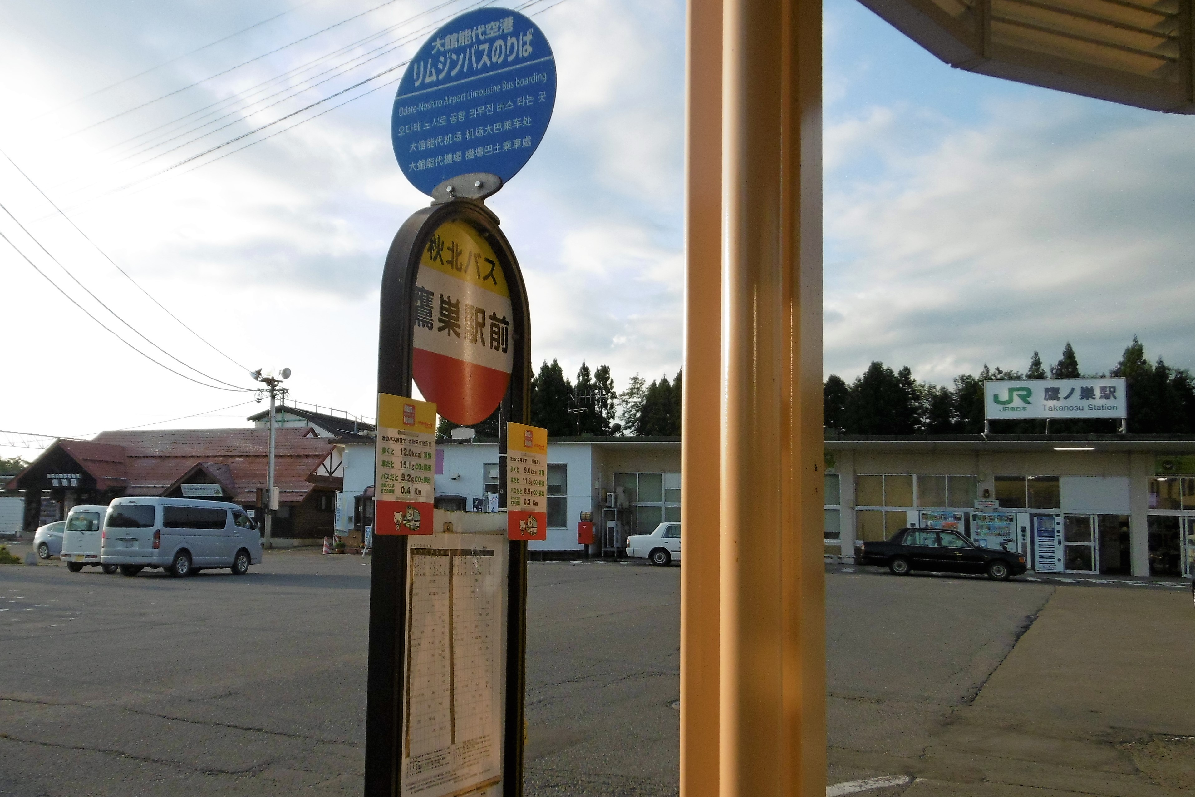 鷹巣駅前 リムジンバスと路線バスのバス乗り場